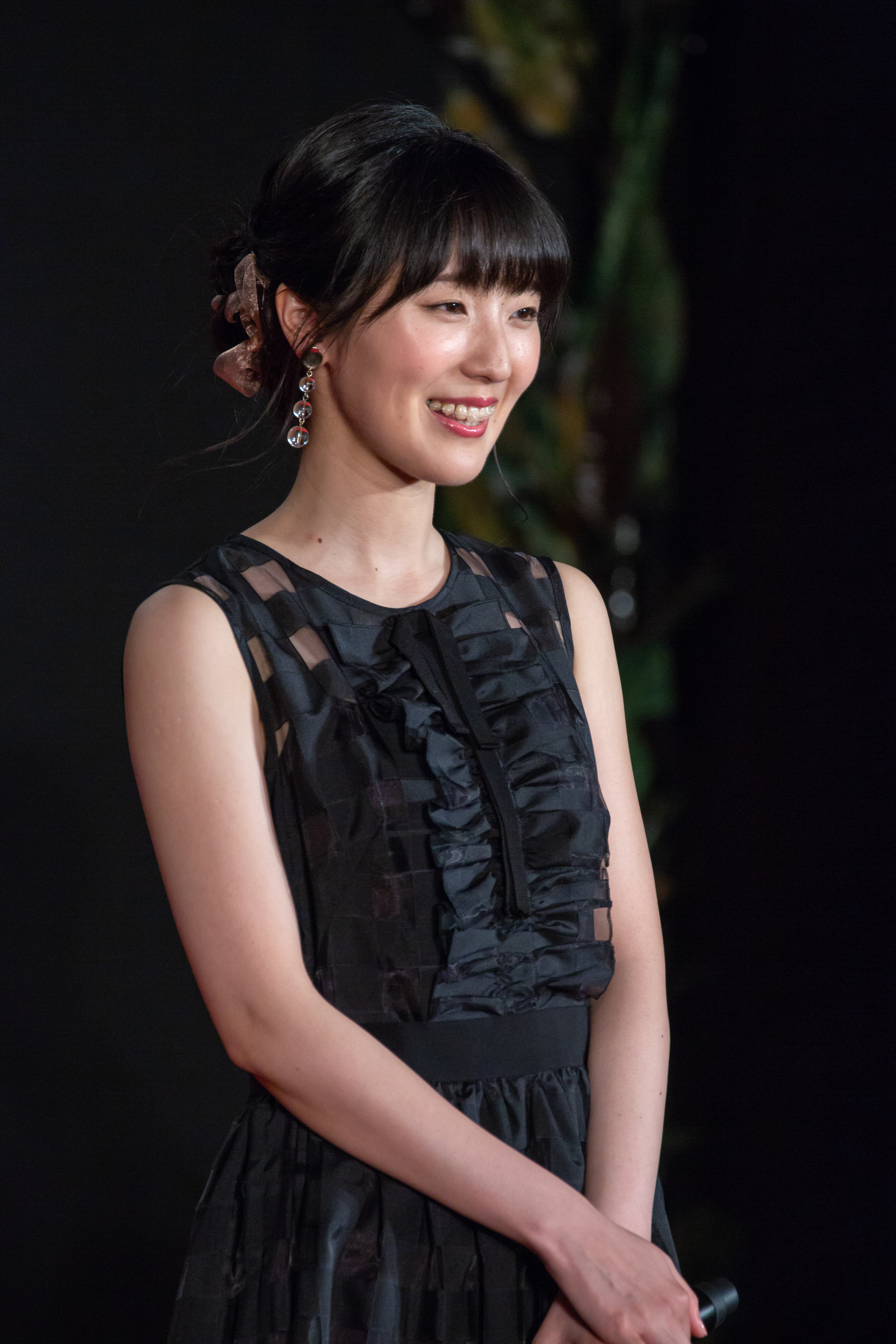 ジュラシック・ワールド/炎の王国 ジャパン・プレミア レッドカーペット 石川由依